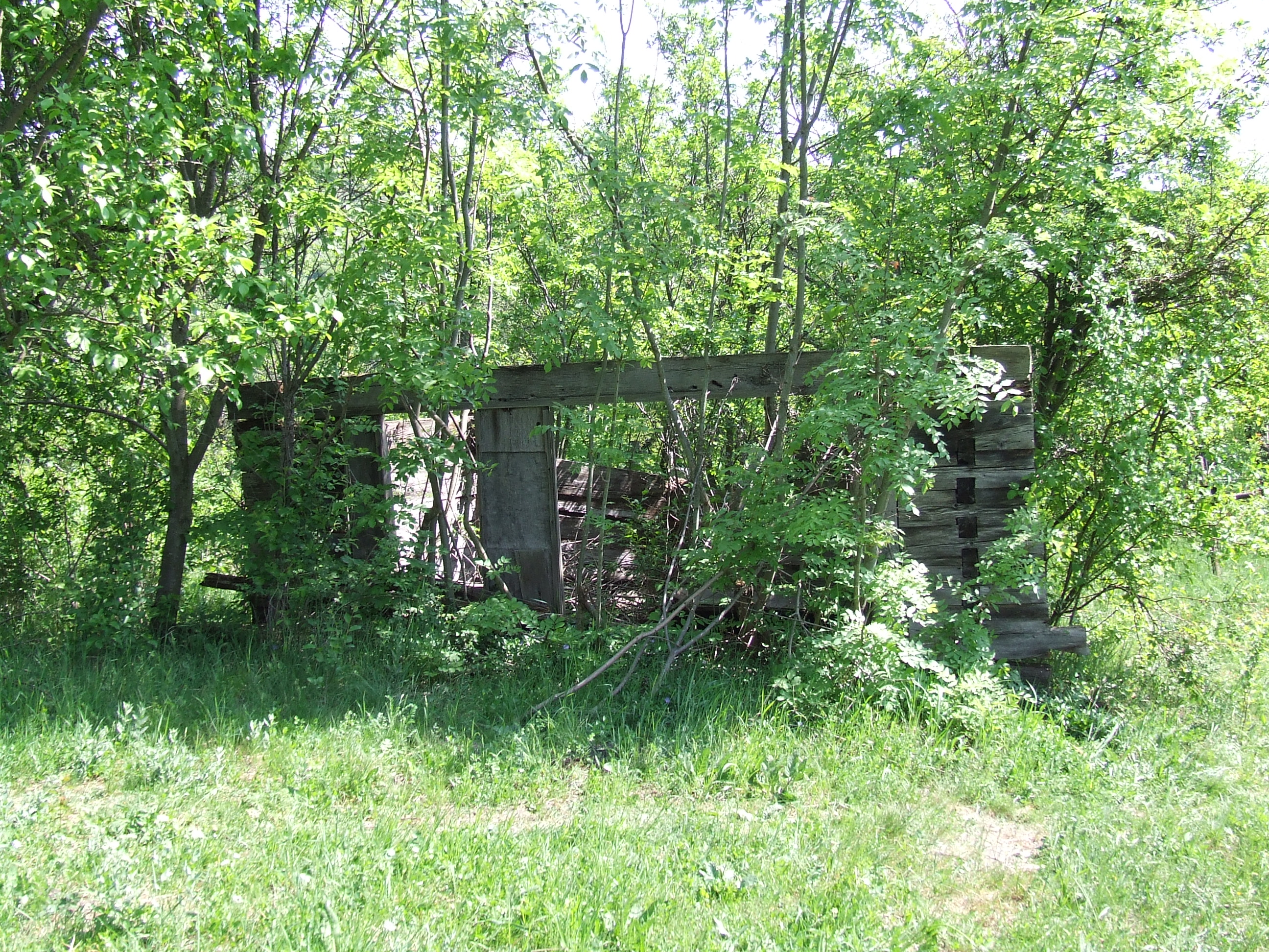 Biserica de lemn din Căianu, judeţul Cluj.